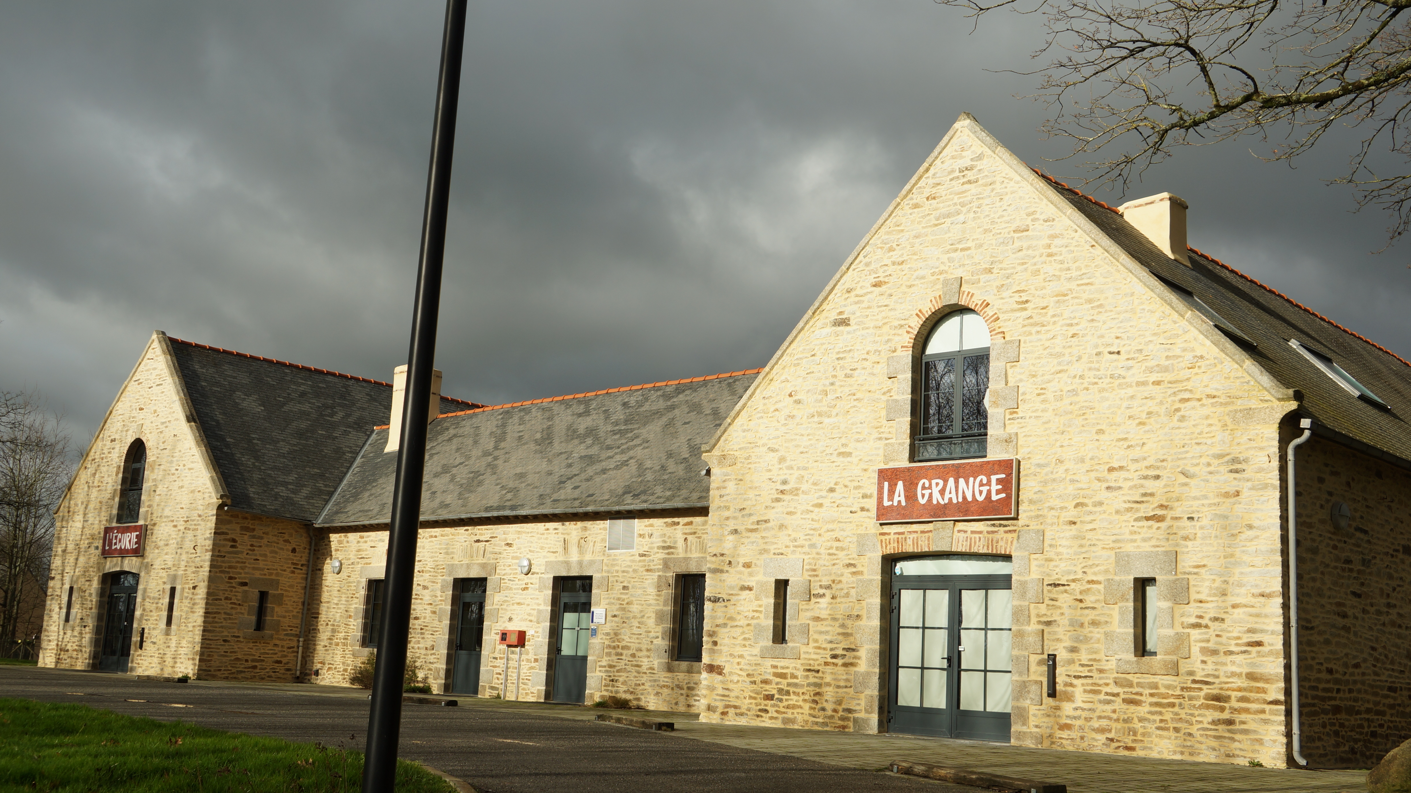 Façade avant de la ferme de Coueslé une ancienne grange reconvertie en salle multifonctions.